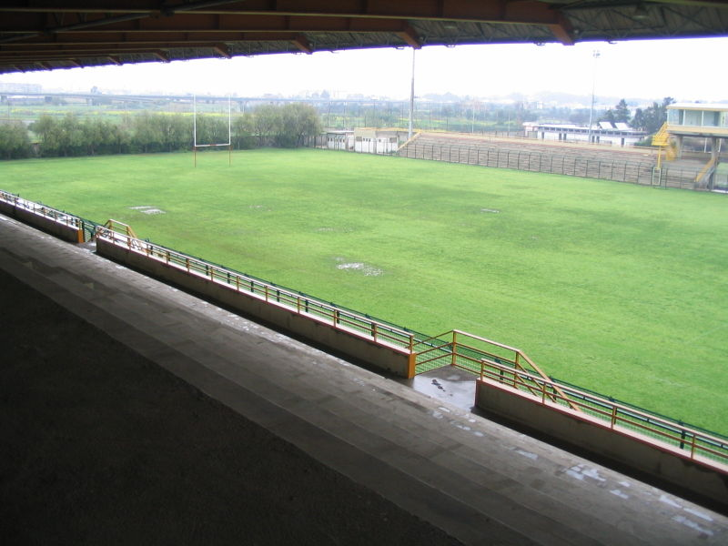 Fotografia di Roberto Quartarone dello stadio Santa Maria Goretti di Catania, che ospita la squadra di rugby dell'Amatori.